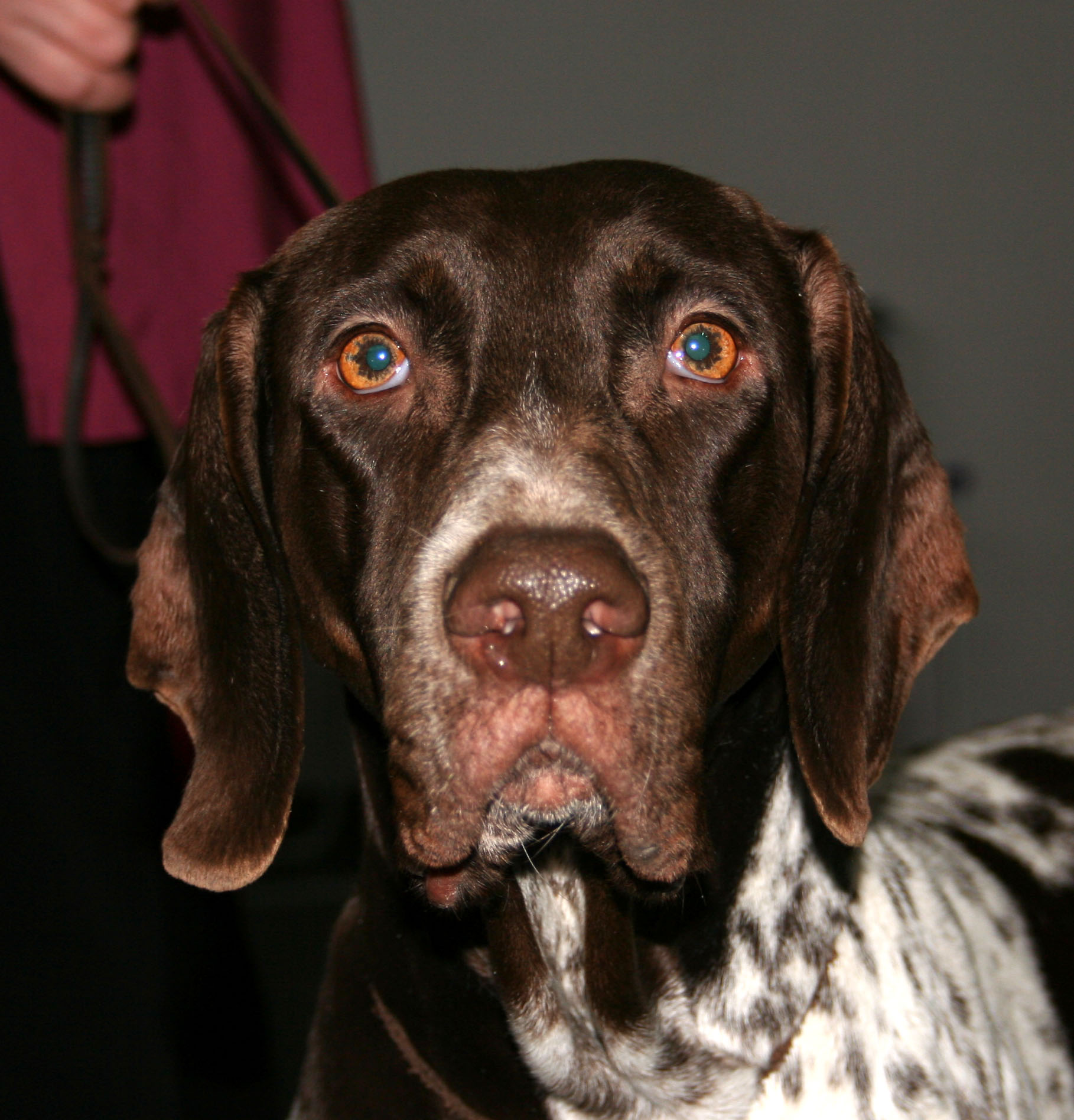 Wyżeł_duński na Światowej Wystawie Psów Rasowych w Poznaniu